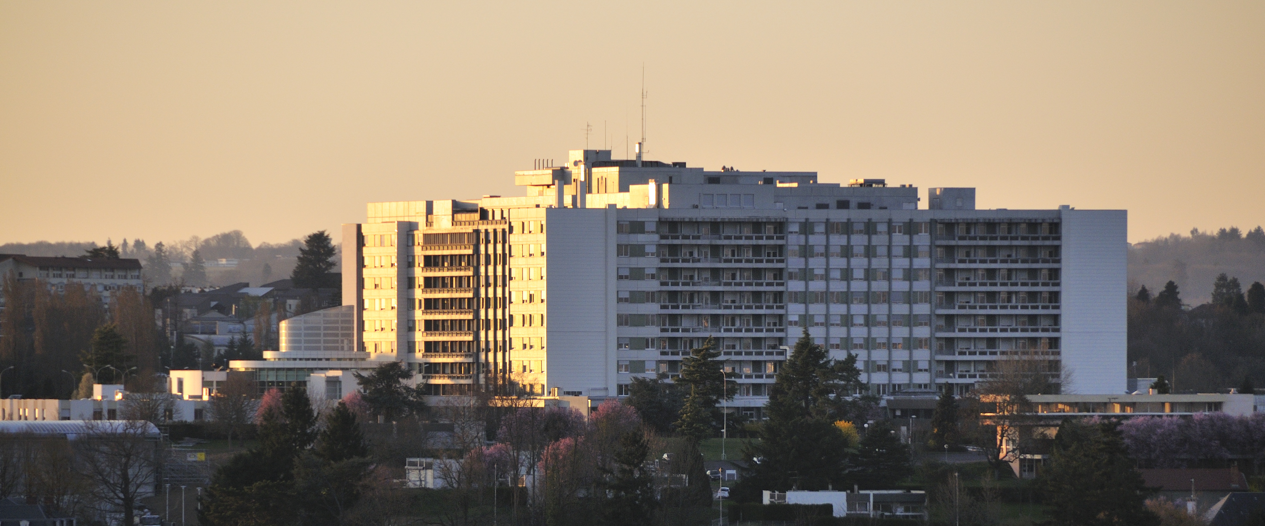 Le CHU de Limoges vue de Condat